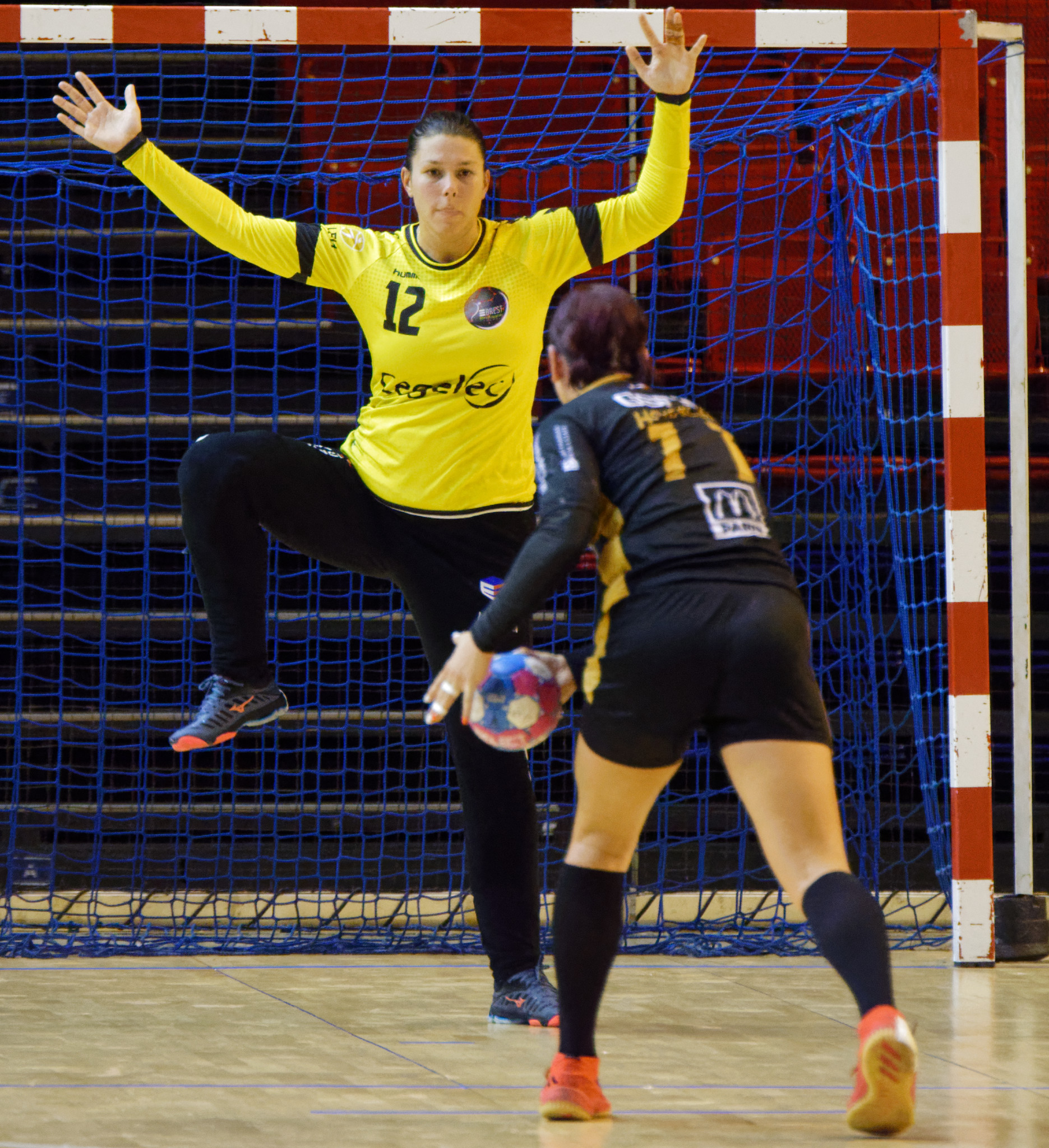 Rencontre de LFH entre Paris 92 et Brest Bretagne Handball. A la Halle Carpentier (Paris), le 05 septembre 2018.